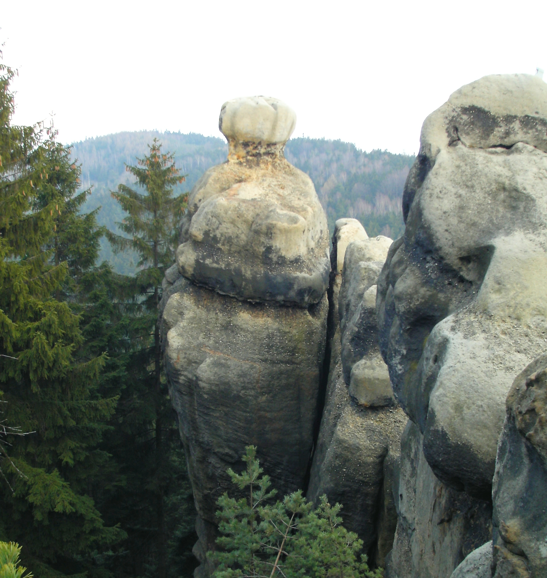 Mehlsack, Weißbachtal(Zittauer Gebirge), Germany